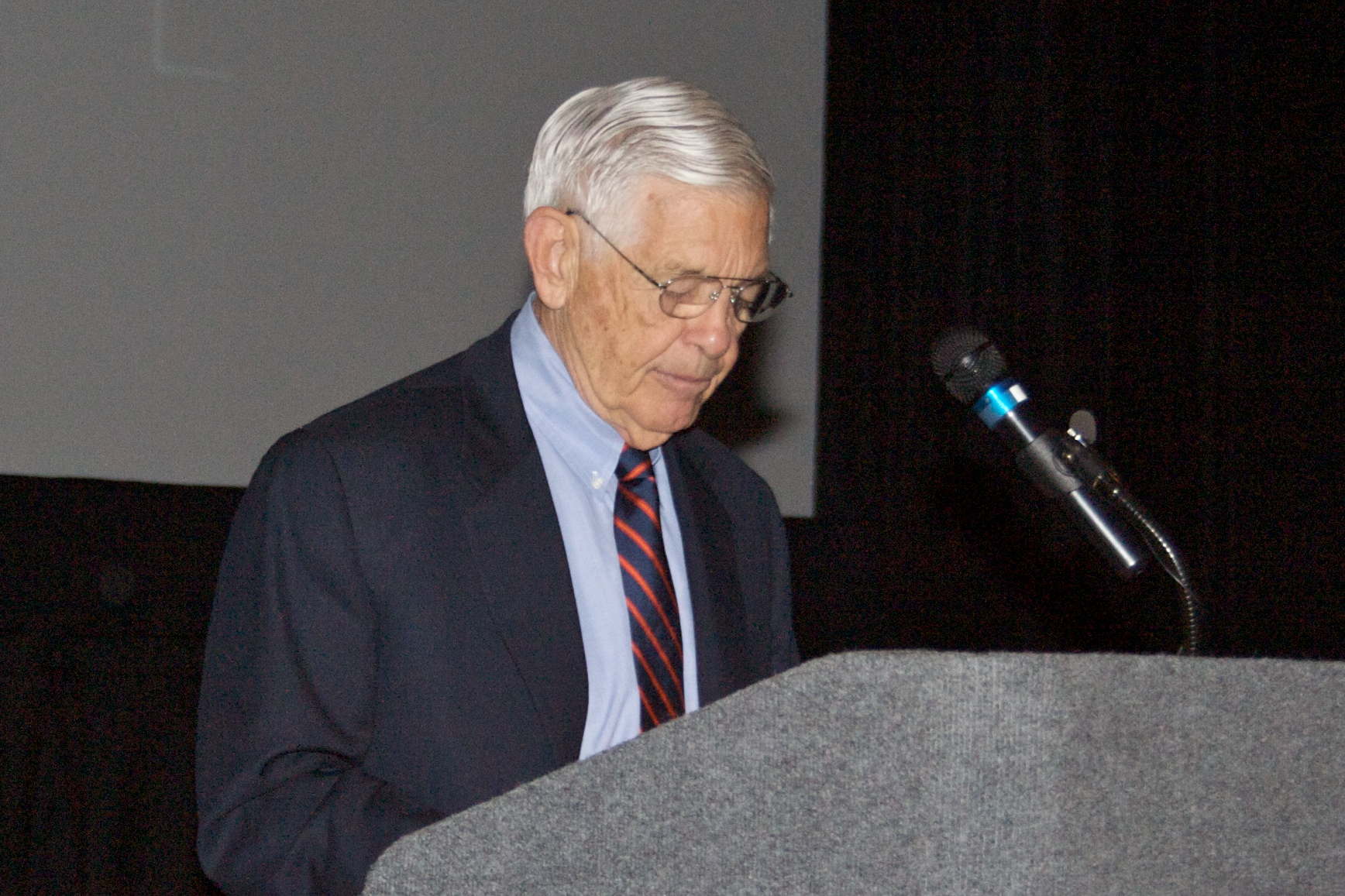 see more